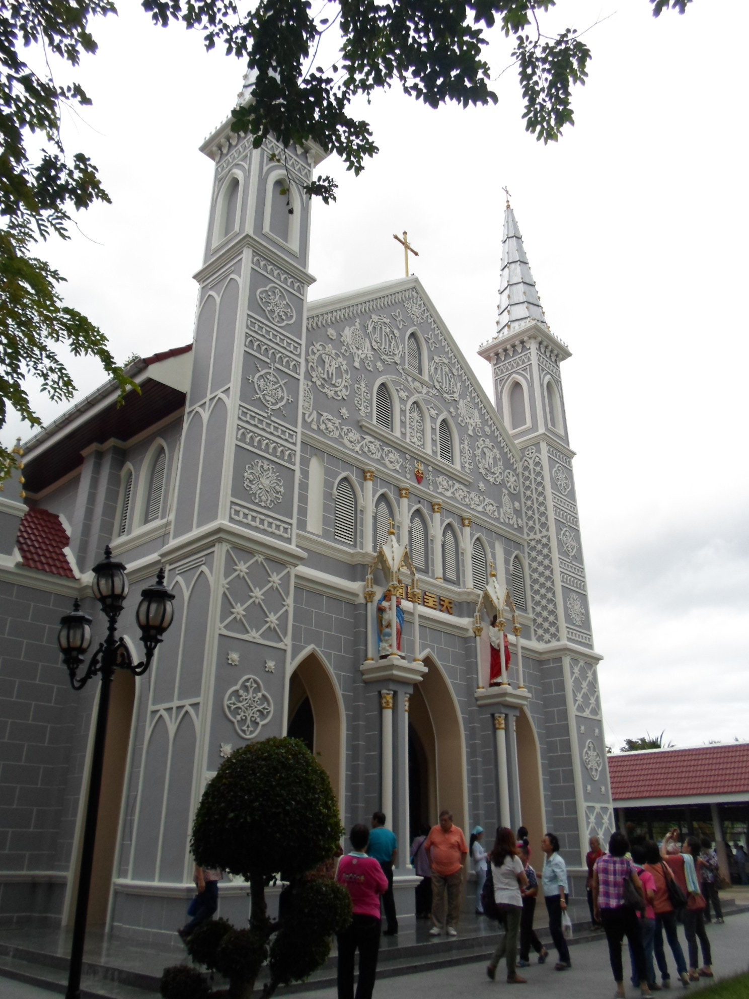 โบสถ์คริสต์วัดพระหฤทัย